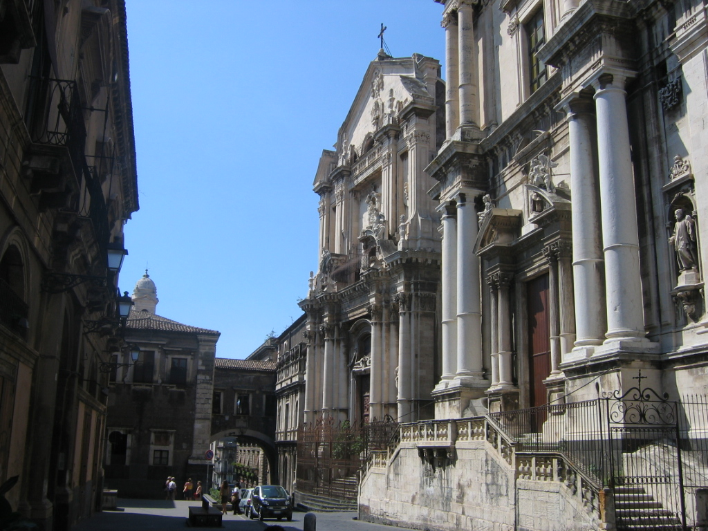 La chiesa di San Benedetto a Catania, in Via Crociferi.